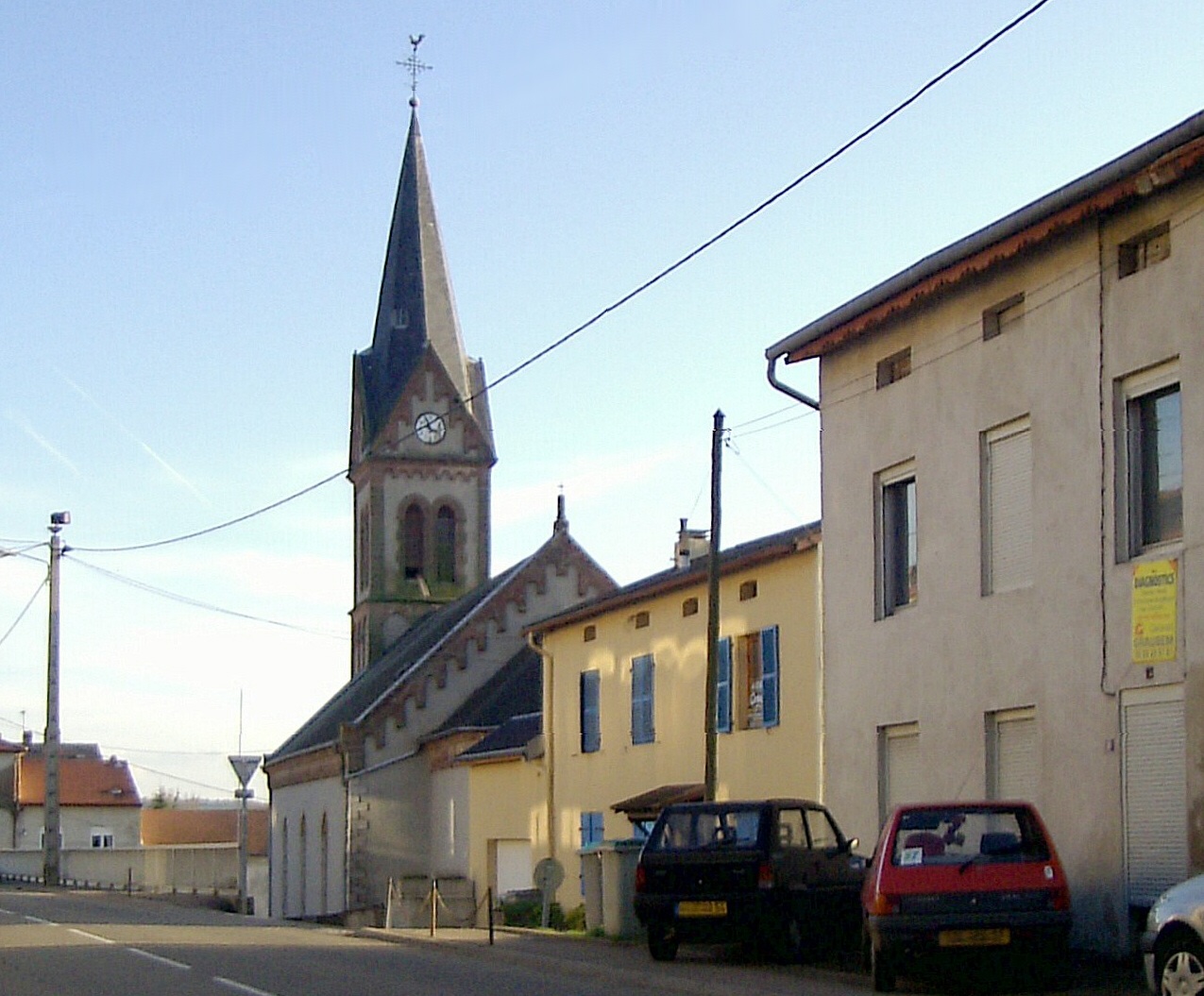 L'église Saint-Jean-Baptiste à Bionville-sur-Nied